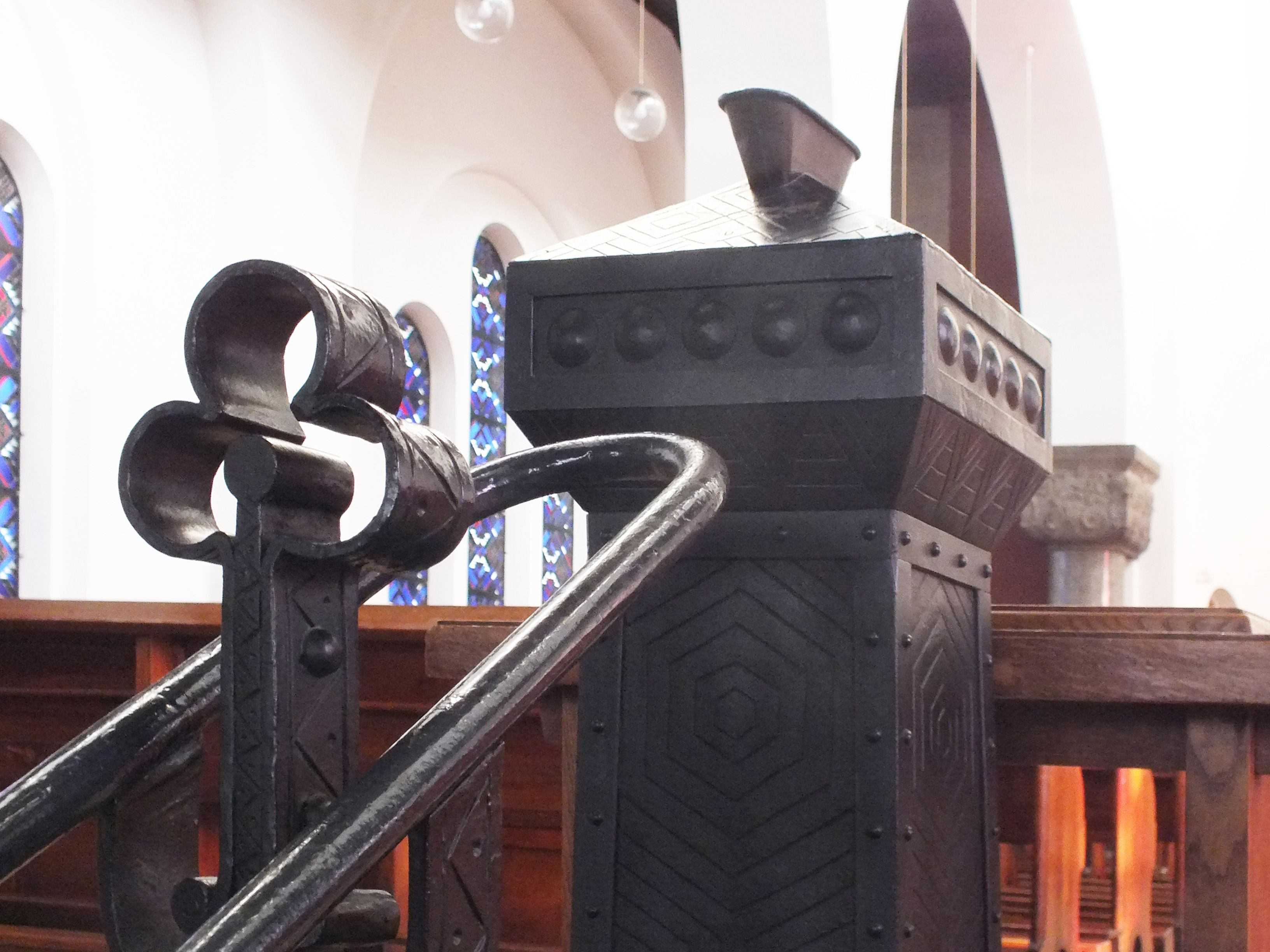 Opferstock am Treppenaufgang der Liebfrauenkirche Leipzig-Lindenau